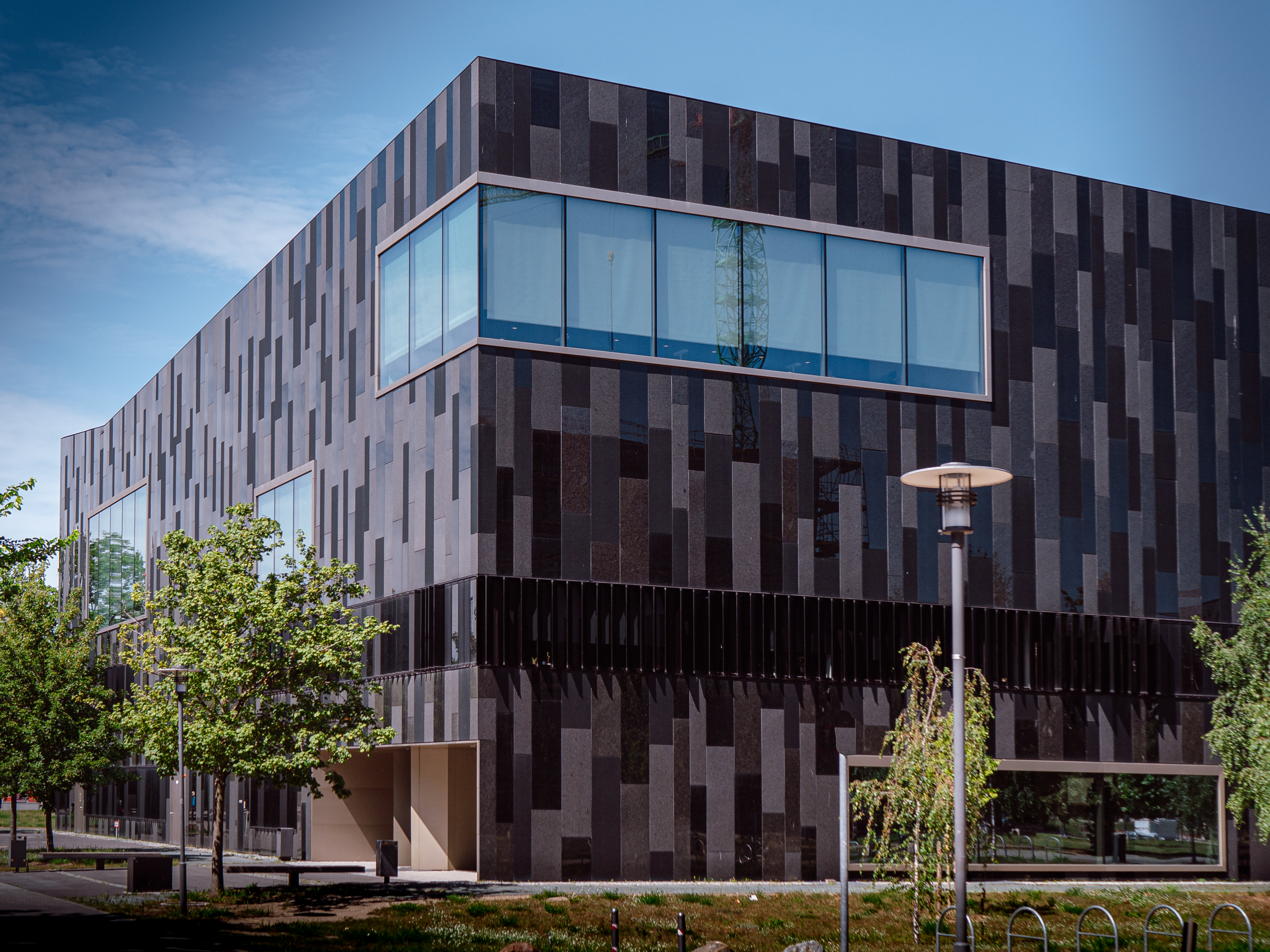 Universität Potsdam, Golm, Bibliothek